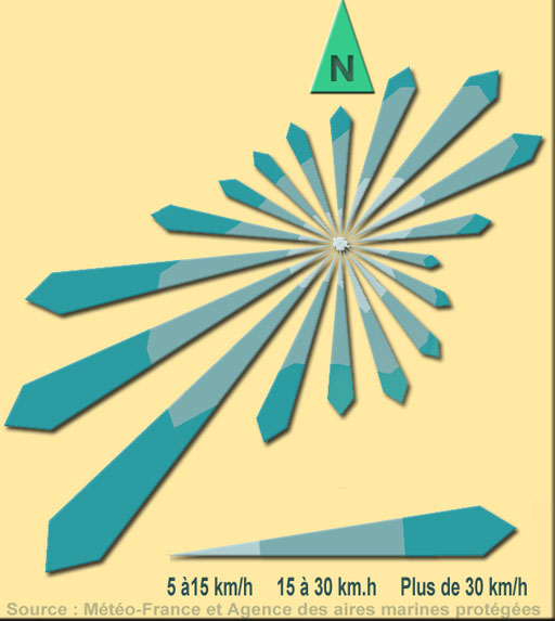 Exemple de représentation graphique ( en "rose des vents") des variations de force moyenne des vents selon leur orientation et direction, ici à Boulogne-sur-Mer, ville portuaire du détroit du Pas-de-Calais. Les vents dominants et les vents les plus forts se superposent globalement aux courants et à la direction (résultante) du déplacement de la masse d'eau de la Manche vers la Mer du Nord. Ces vents (vent dominants forts venant du Sud-Ouest) quand ils vont dans le même sens que l'onde de marée montante peuvent causer des "surcotes" de marée haute.